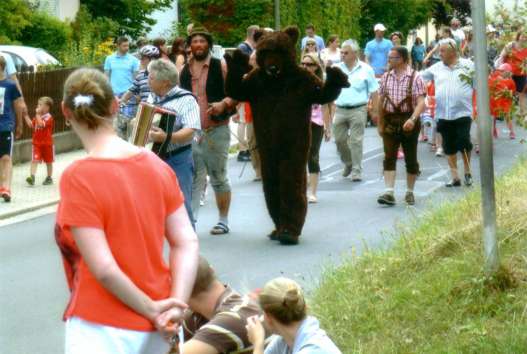 Bindlacher Bär, 2015